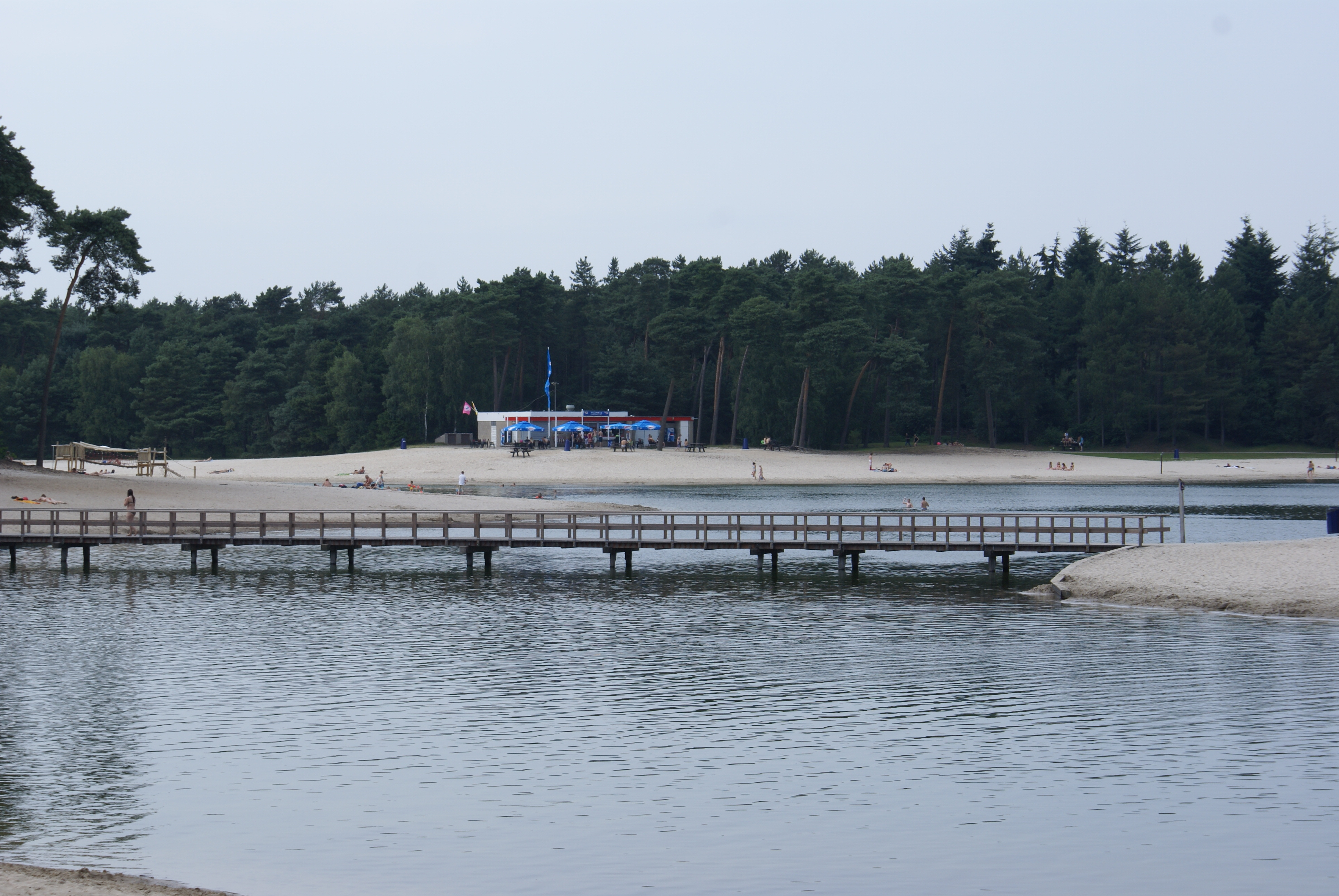 Henschotermeer